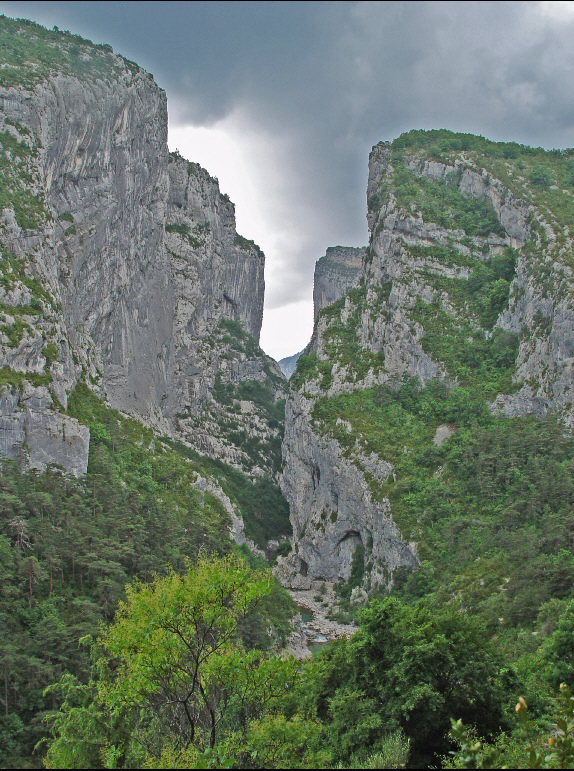 Le couloir Samson. Vue du Point Sublime, photographié le 15 juin 2004, en fin d'après-midi, par temps d'orage.